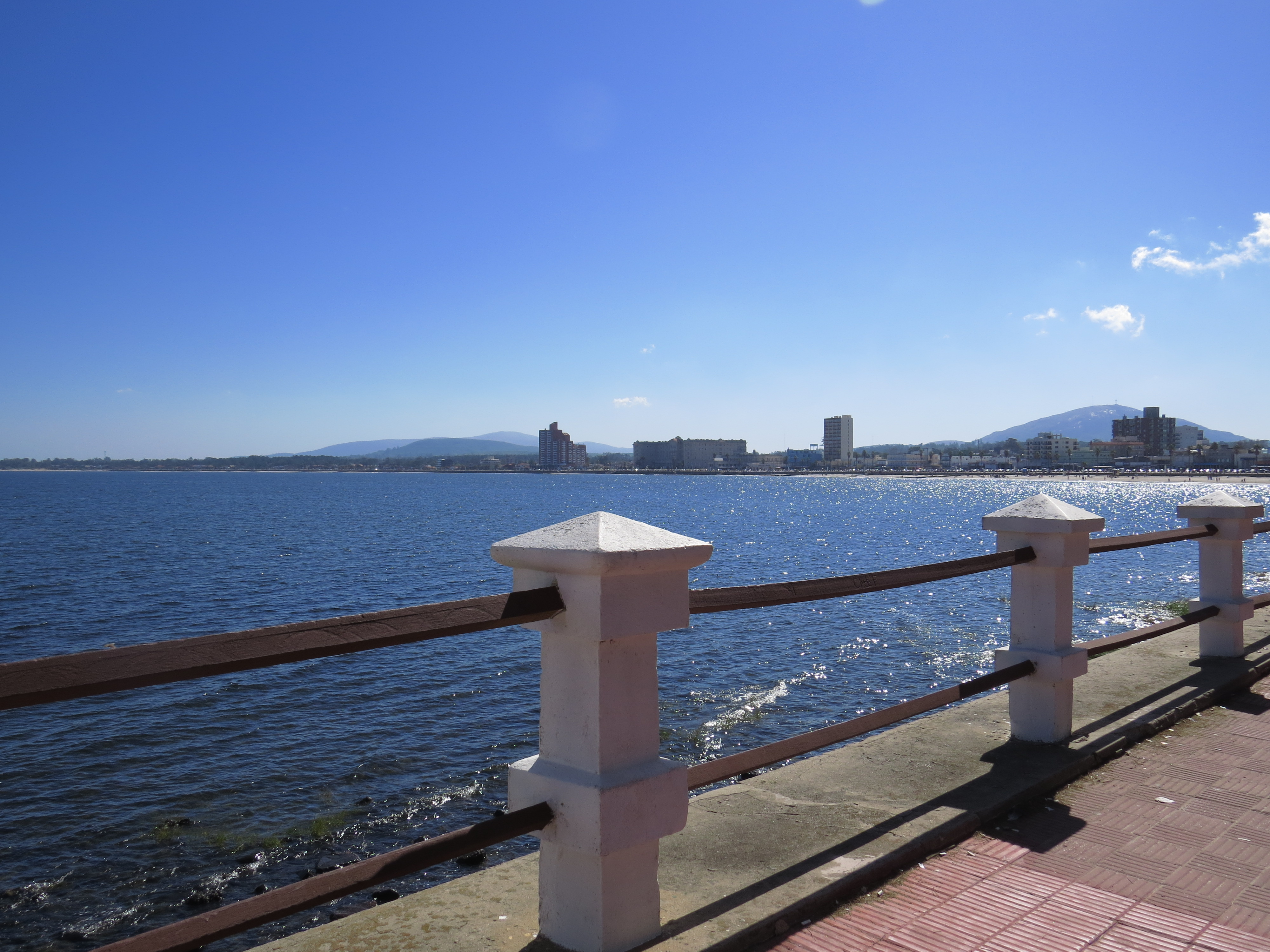 Rambla de Piriapolis